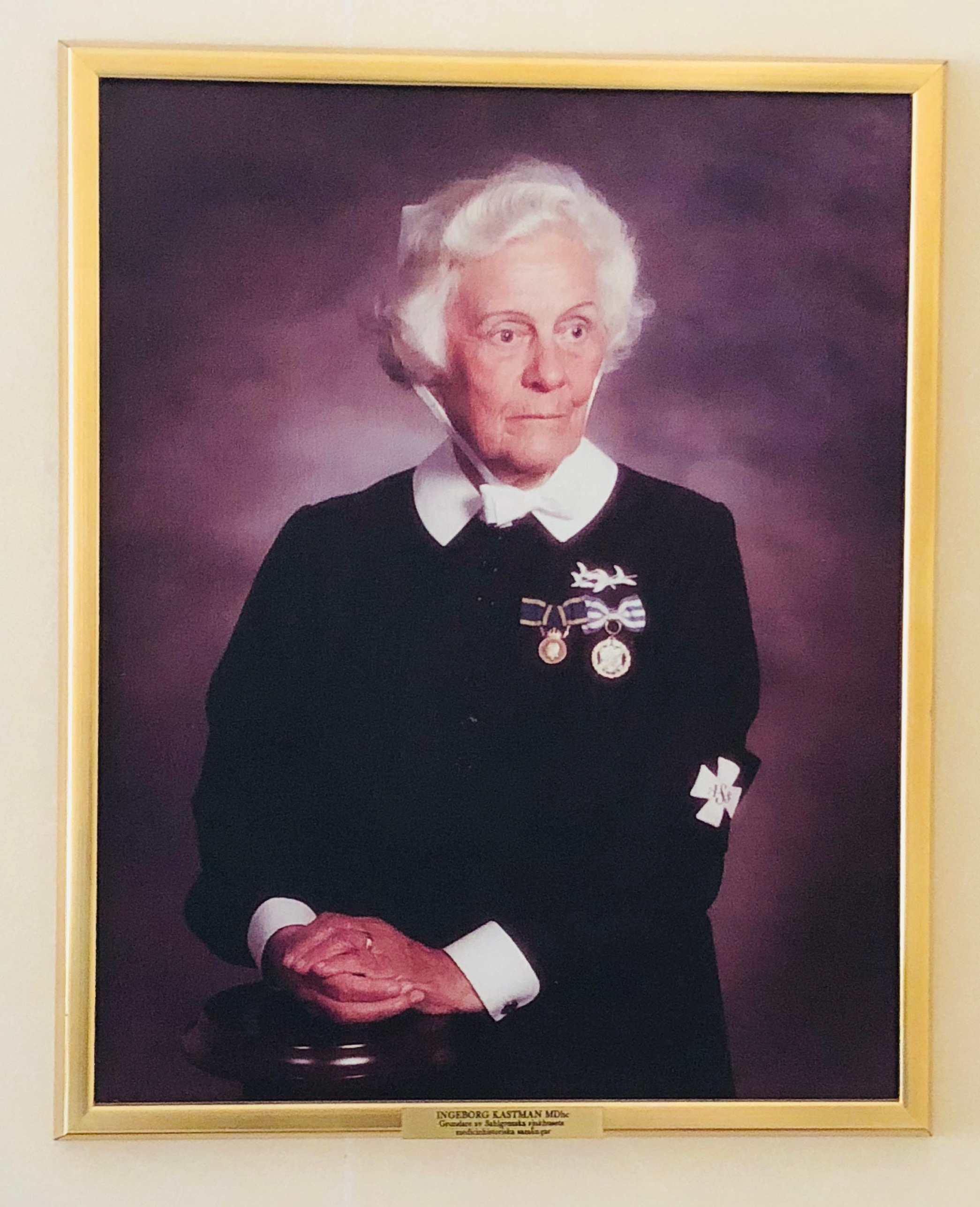 Tavla, hänger i Per Dubbssalen, Sahlgrenska Sjukhuset, Göteborg